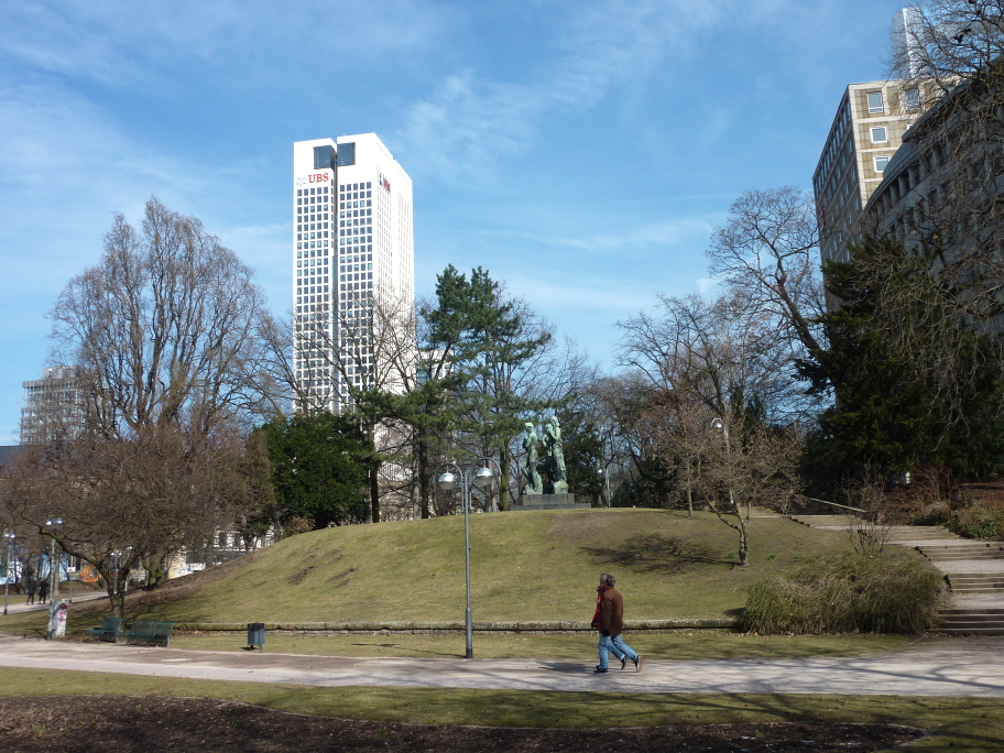 Frankfurter Wallanlagen: Erdhügel in der Taunusanlage; ein Überrest des ehemaligen Junghofbollwerks der Frankfurter Stadtbefestigung. Auf dem Bollwerkhügel ein Ludwig van Beethoven gewidmetes Monument von Bildhauer Georg Kolbe. Im Bildhintergrund das Büro-Hochhaus Opernturm.